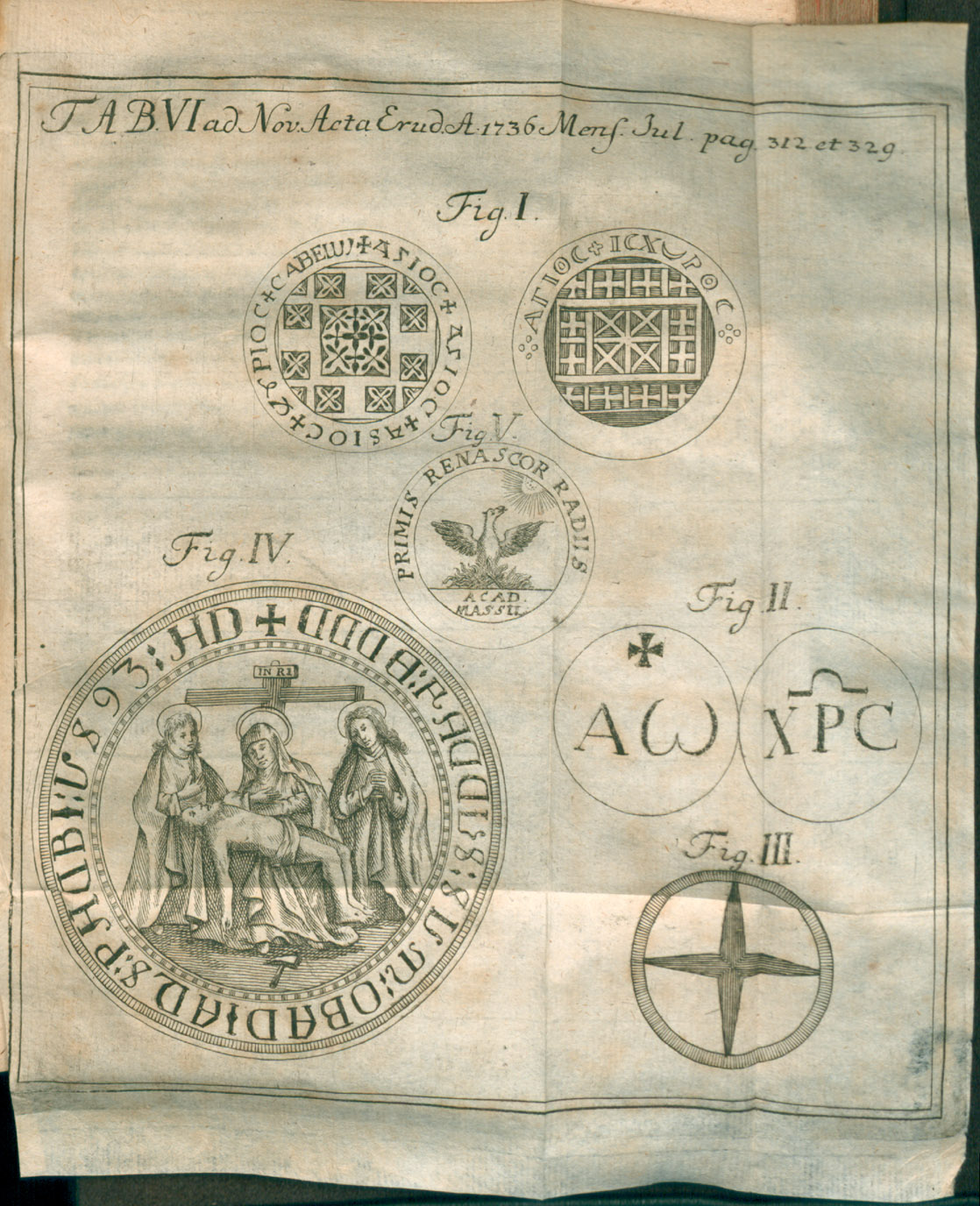 Illustration